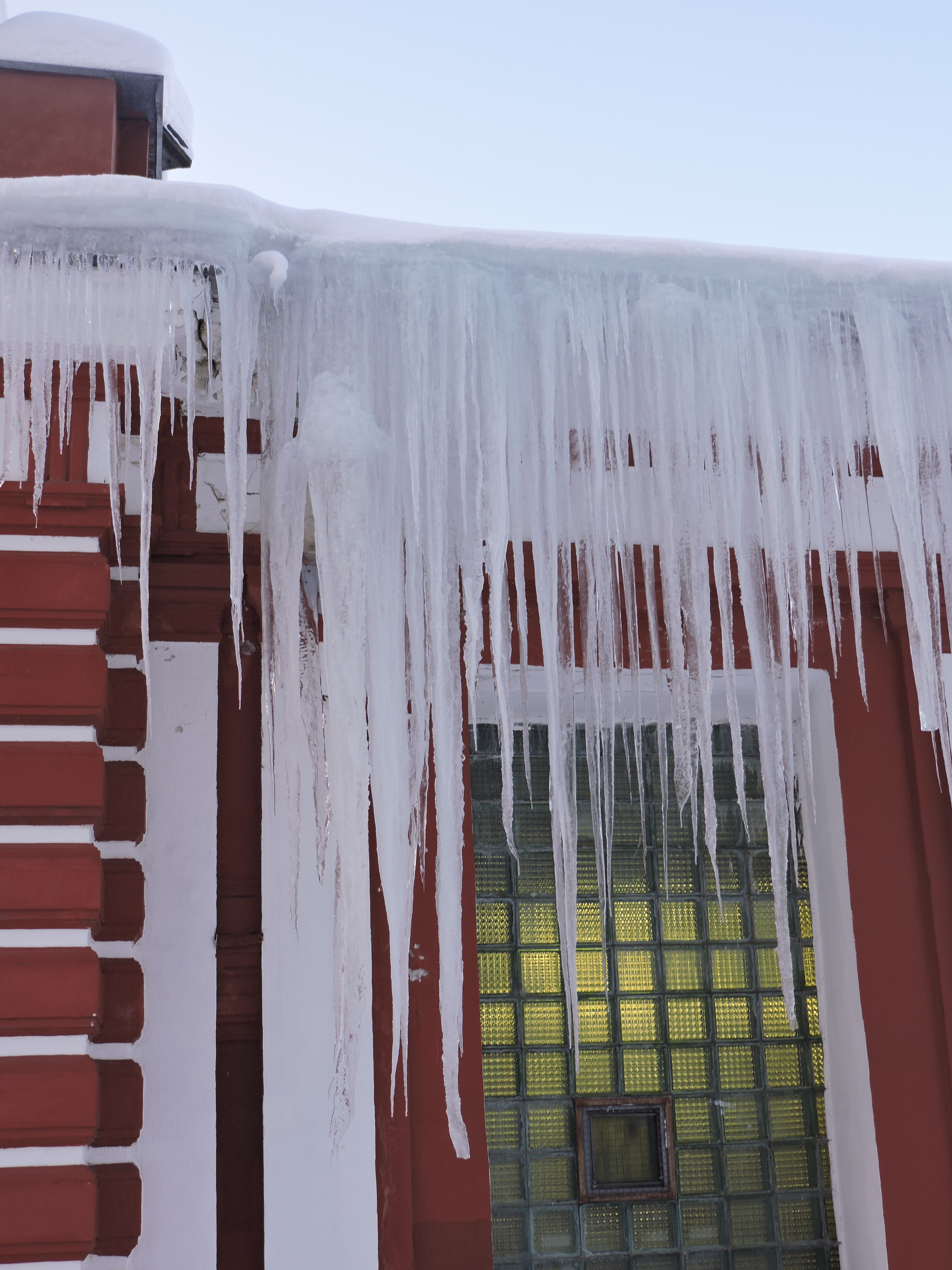 Сосульки или сосули